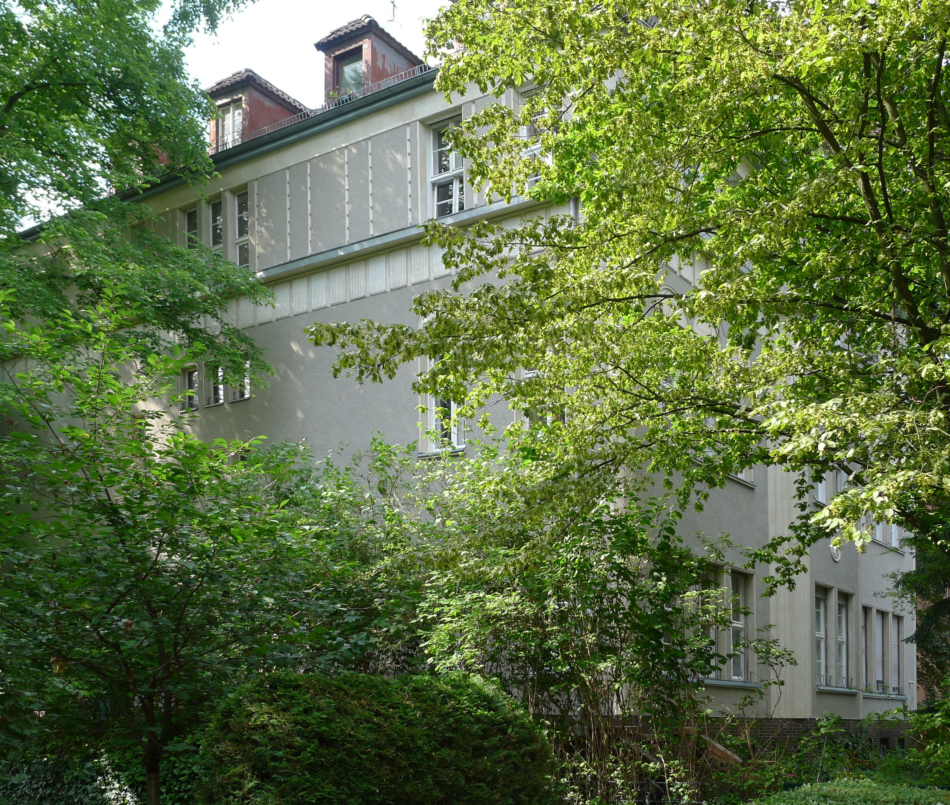 Mietshaus